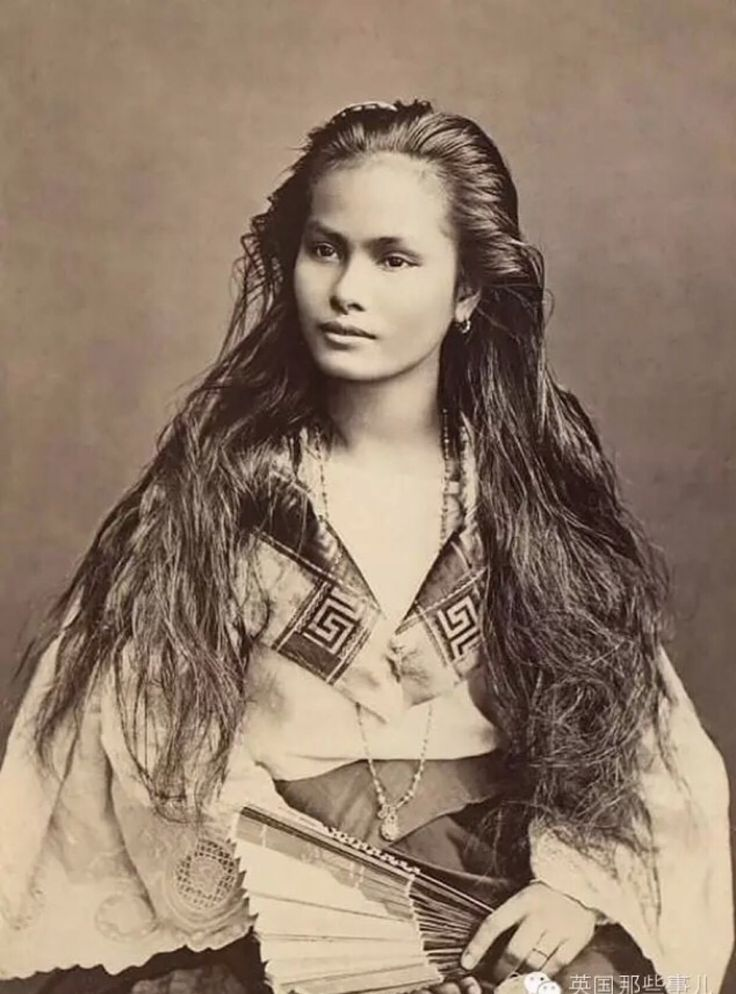 Indígena de clase rica (Mestiza Sangley-Filipina); Image of a real and true Pinay